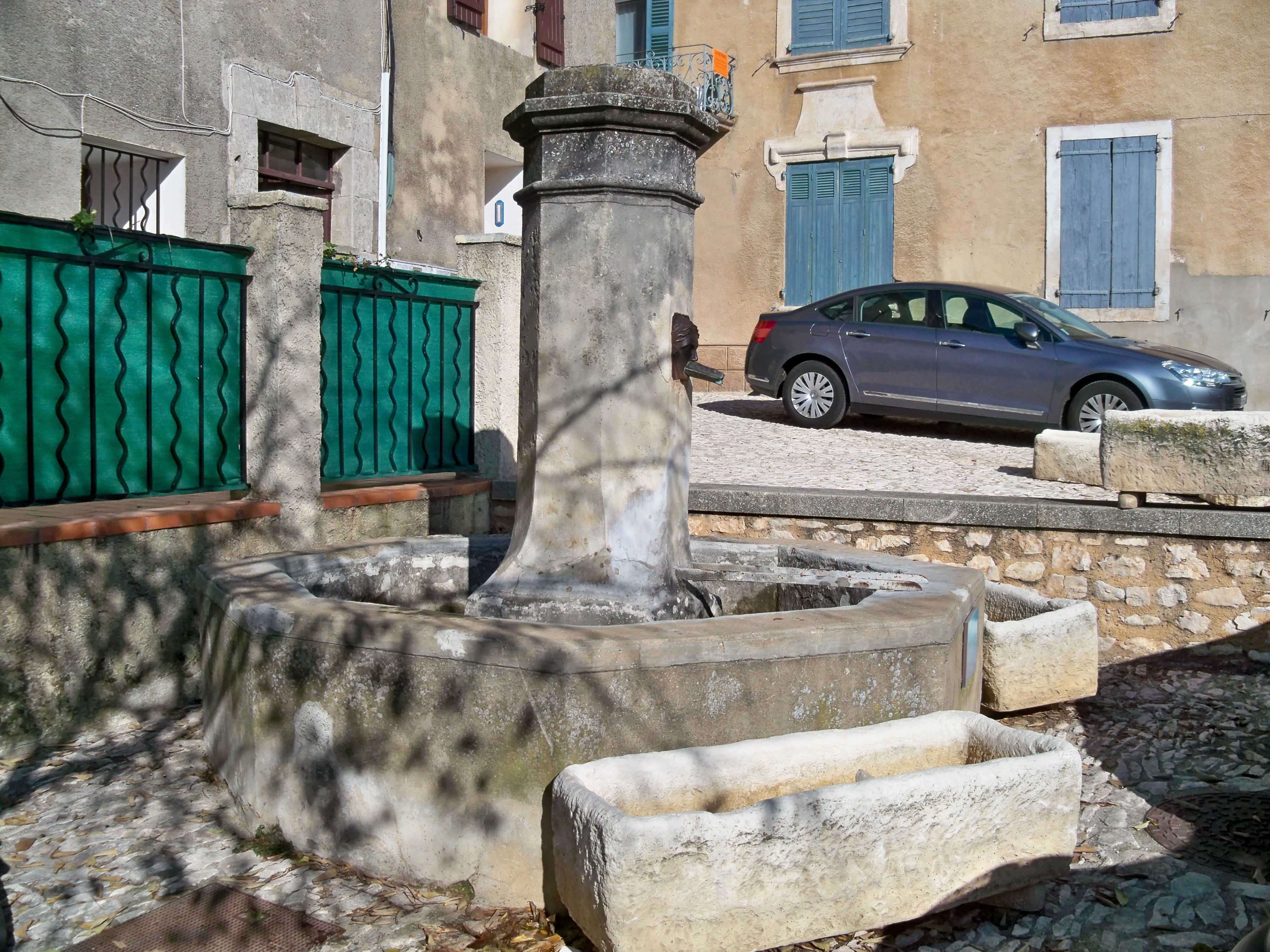 fontaine à Rustrel, Vaucluse, France